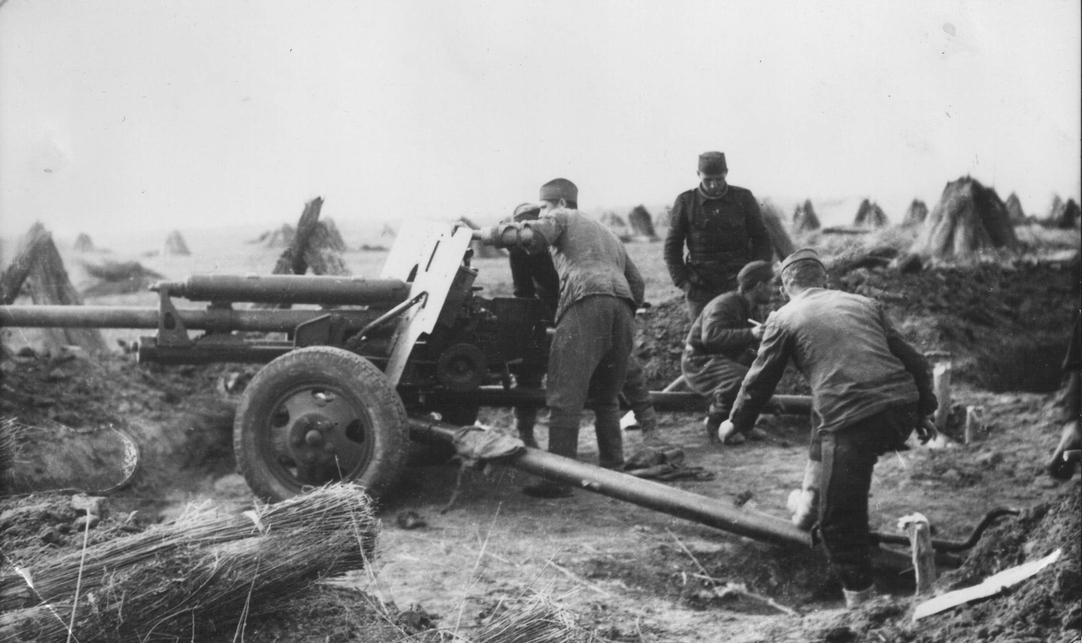 Cannone campale da 76 mm dell'artiglieria jugoslava sul fronte dello Srem nel 1945